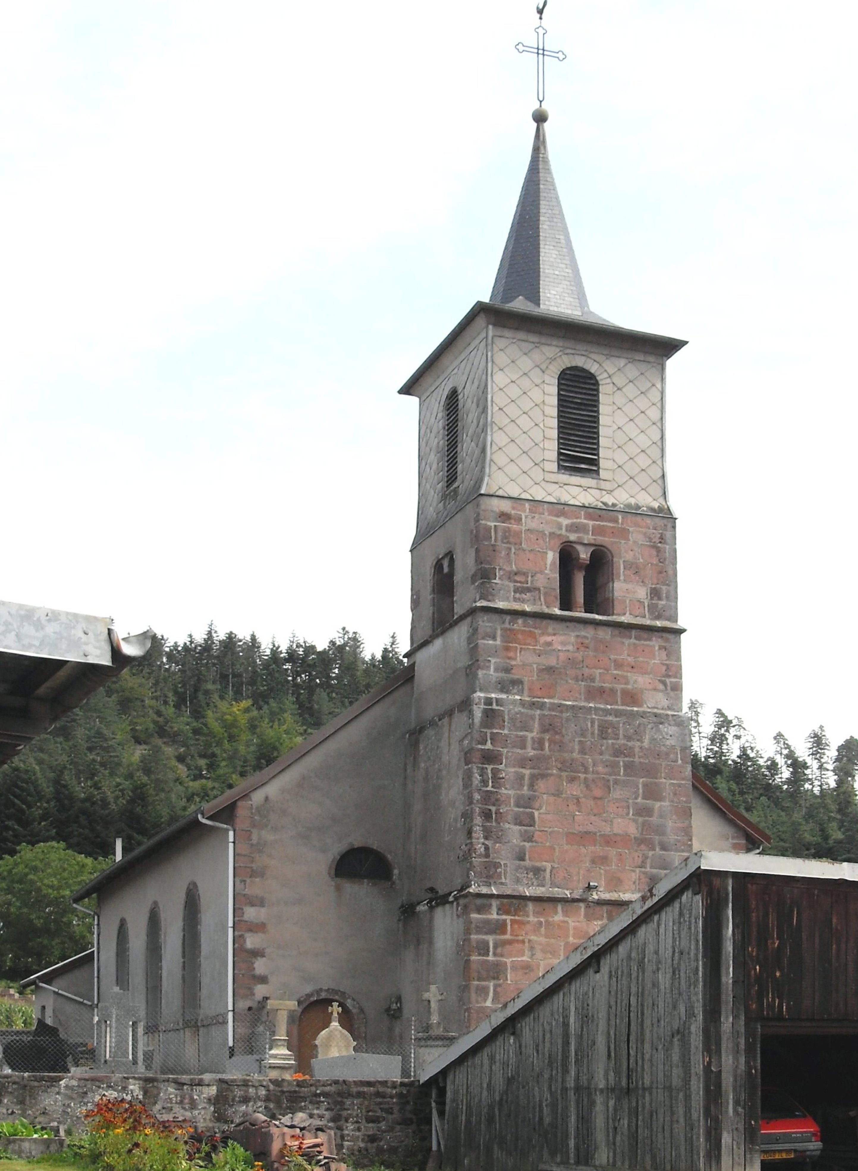 L'église Saint-Jean-Baptiste á Saint-Jean-du-Marché, commune La Neuveville-devant-Lépanges